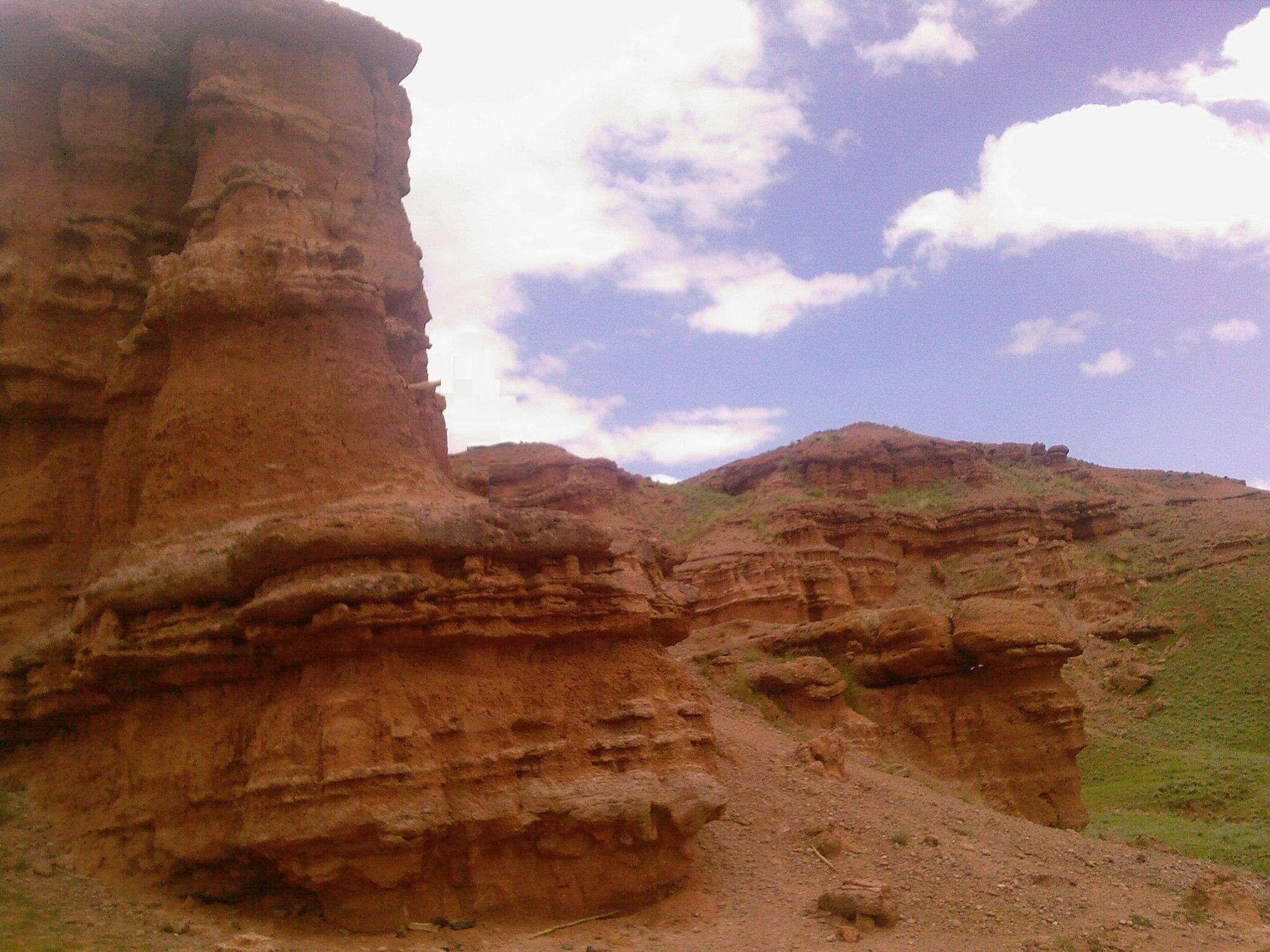 Narman Peribacaları